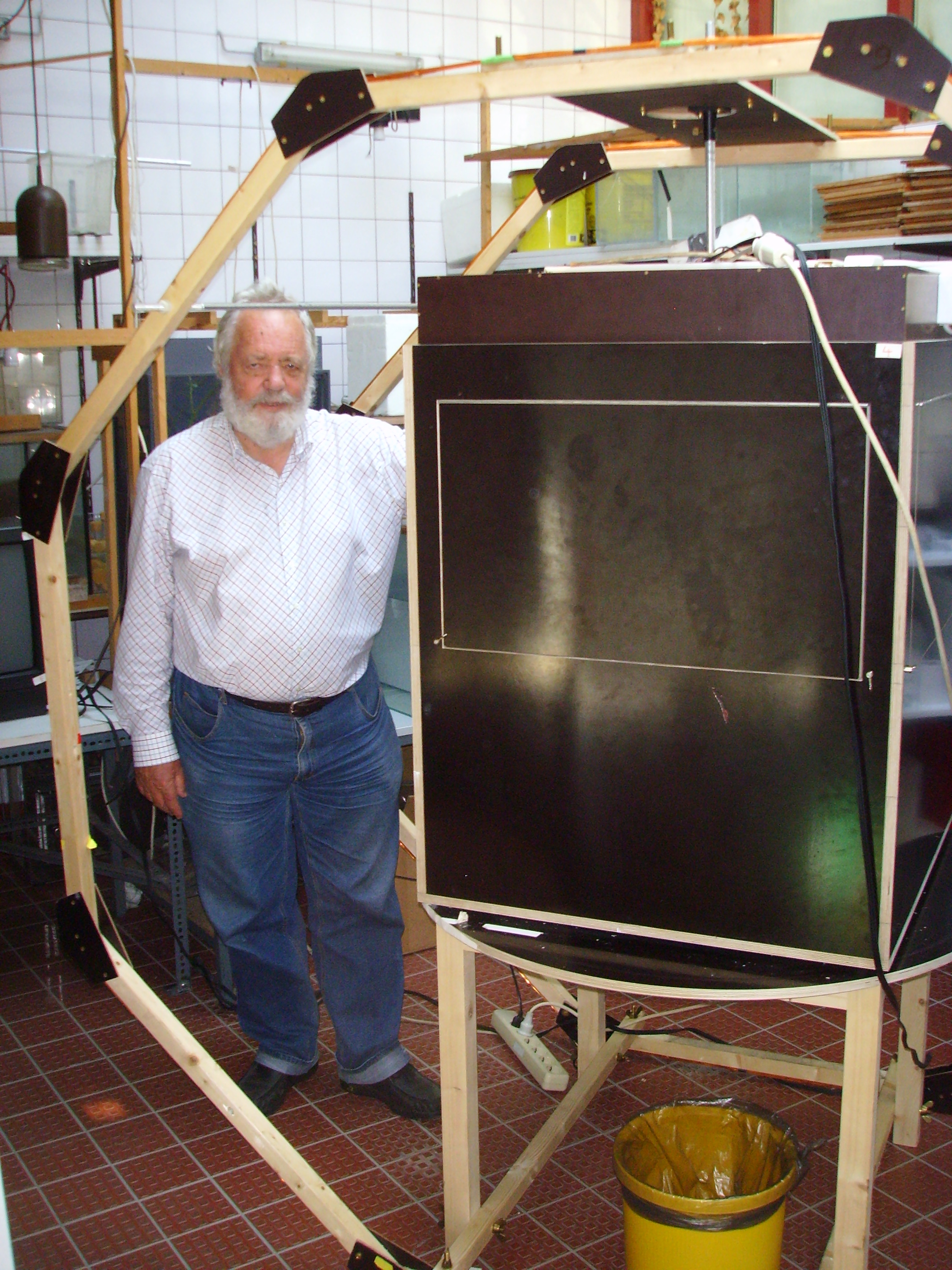 Der Ornithologe Prof. Wolfgang Wiltschko, Universität Frankfurt am Main, neben einer Versuchsanordnung zum Nachweis des Magnetsinns bei Hühnerküken